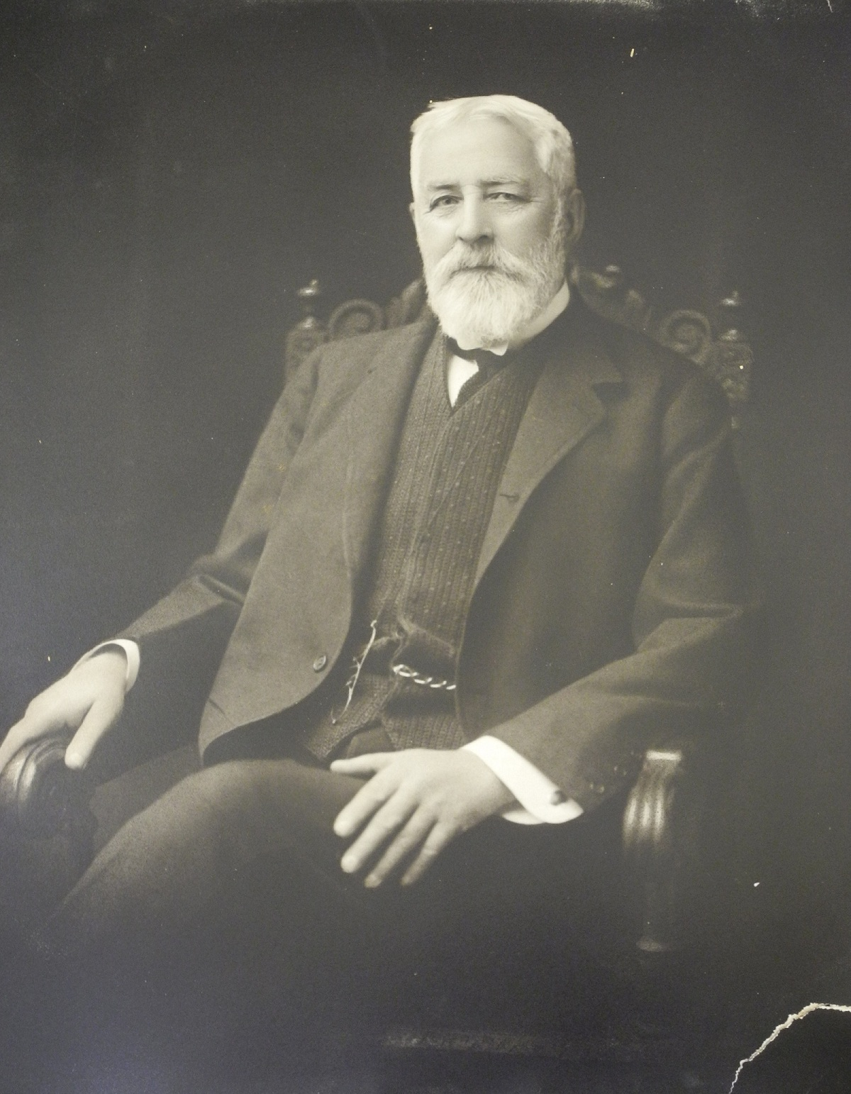 Date: [190-?] Reference code: P962